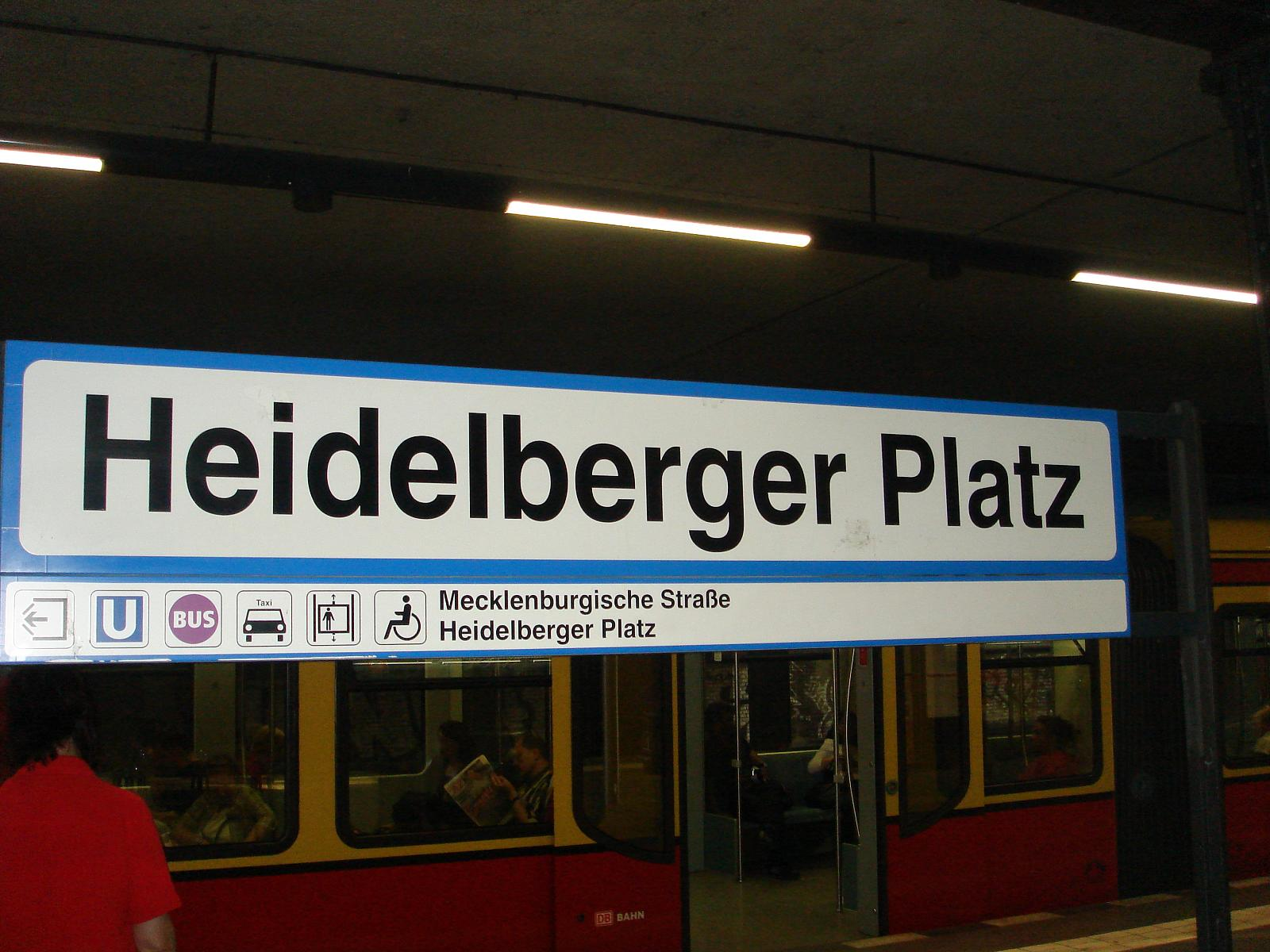 Stationsschild S-Bahnhof Heidelberger Platz